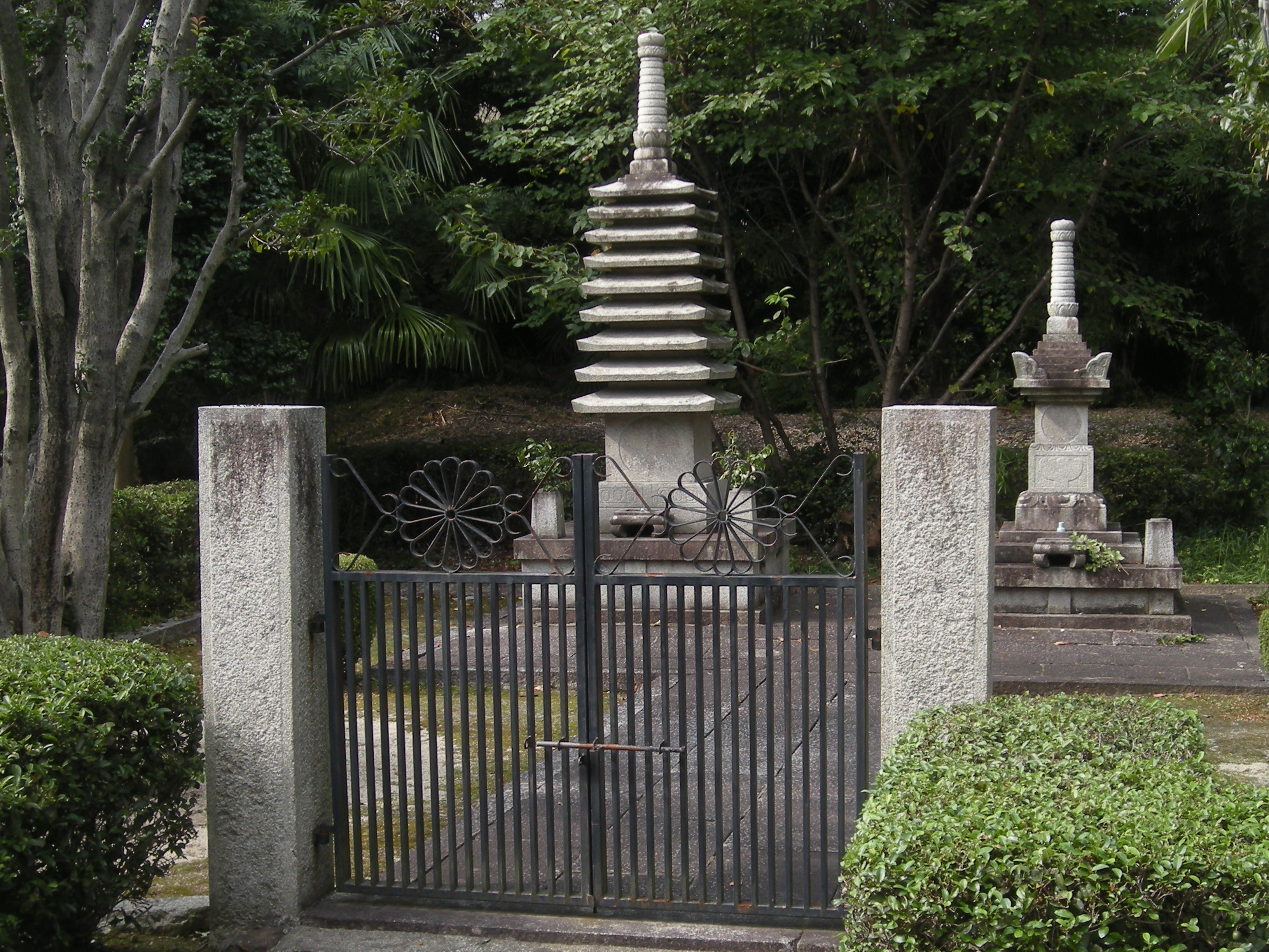 慶瑞禅寺 (高槻市) 聖歯塔